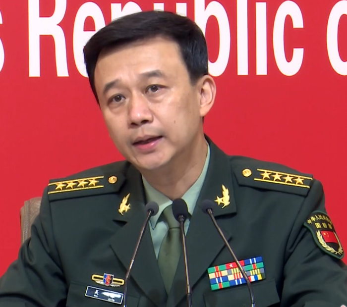 粵語: 共軍大校吳謙